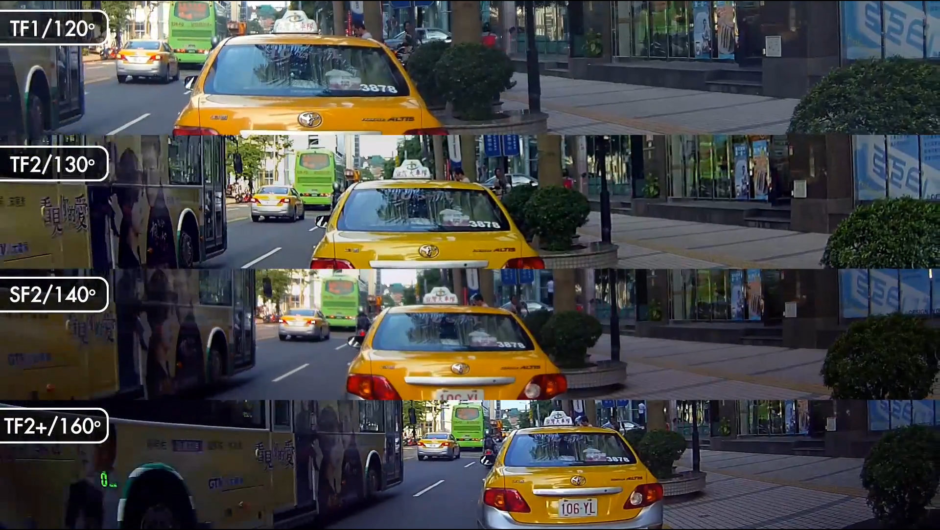 Weitwinkel Linsen in der Übersicht. Bis zu 160° Weitwinkel bisher möglich.